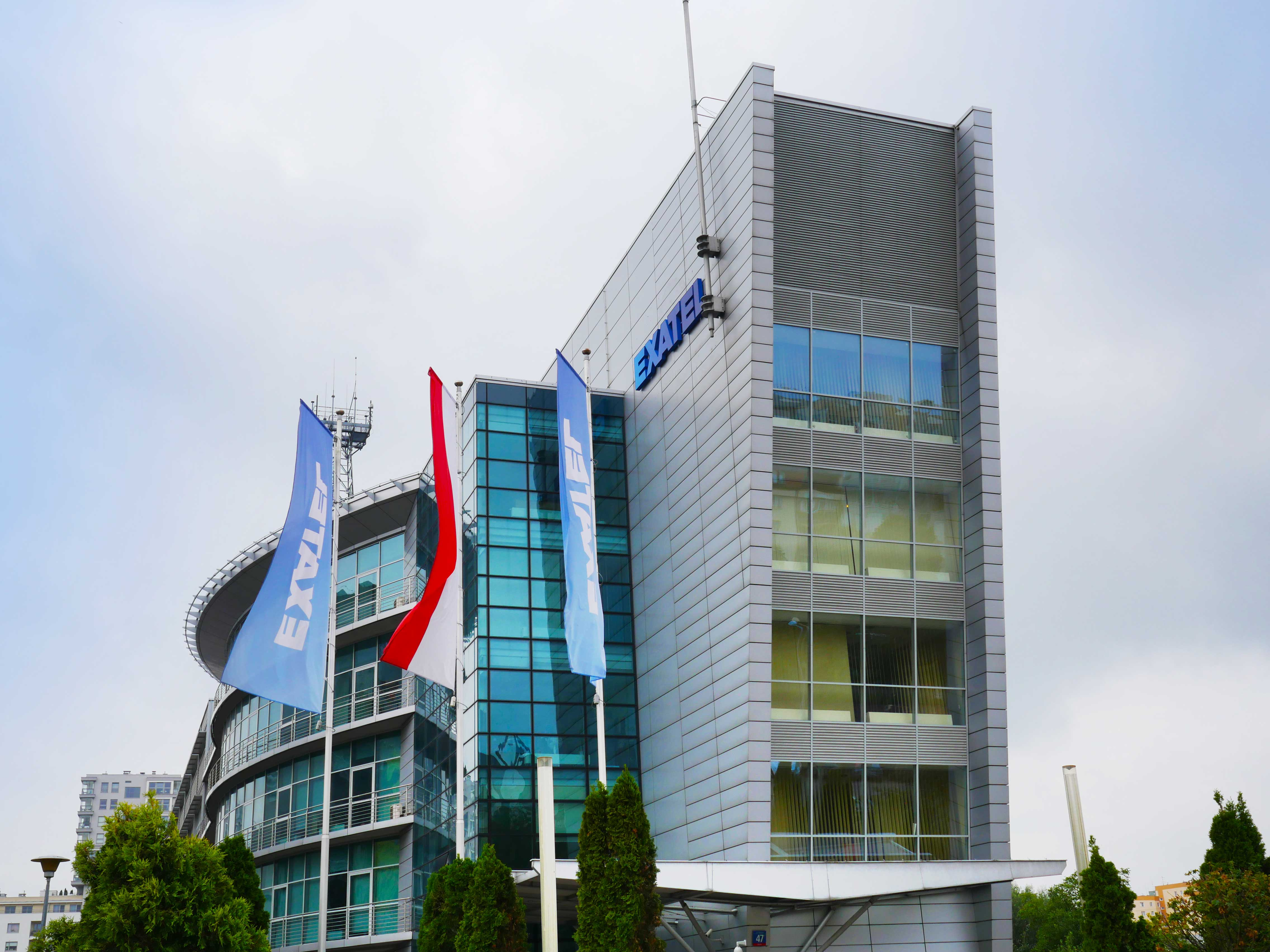 Budynek biurowy EXATEL. Warszawa, Perkuna 47. Widoczne nowe logo, obowiązujące od czerwca 2018.